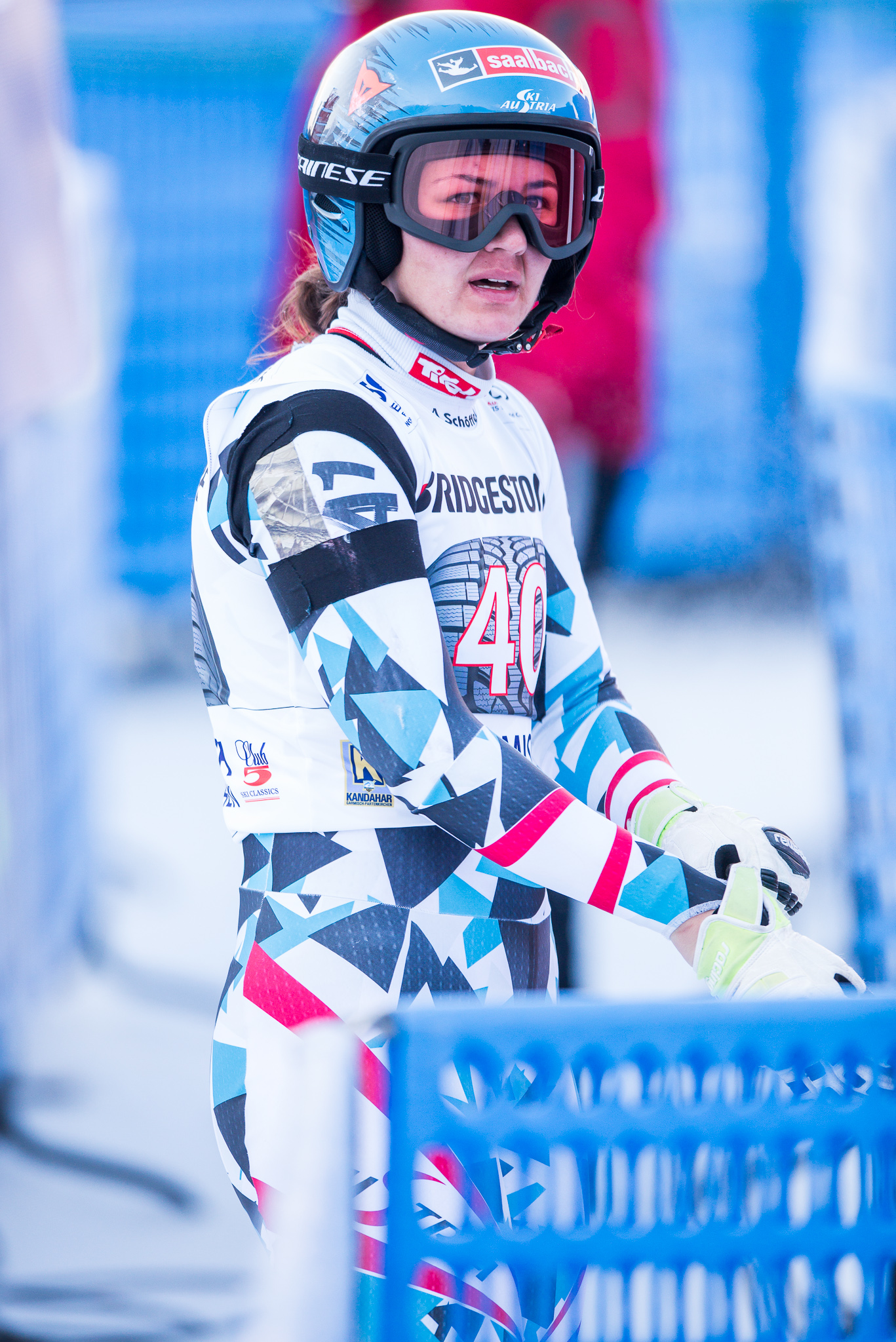 64. Kandahar Rennen,Audi FIS Ski Weltcup Garmisch-Partenkirchen,Damen Abfahrt,Kandahar,Ladies Downhill,Sabrina Maier